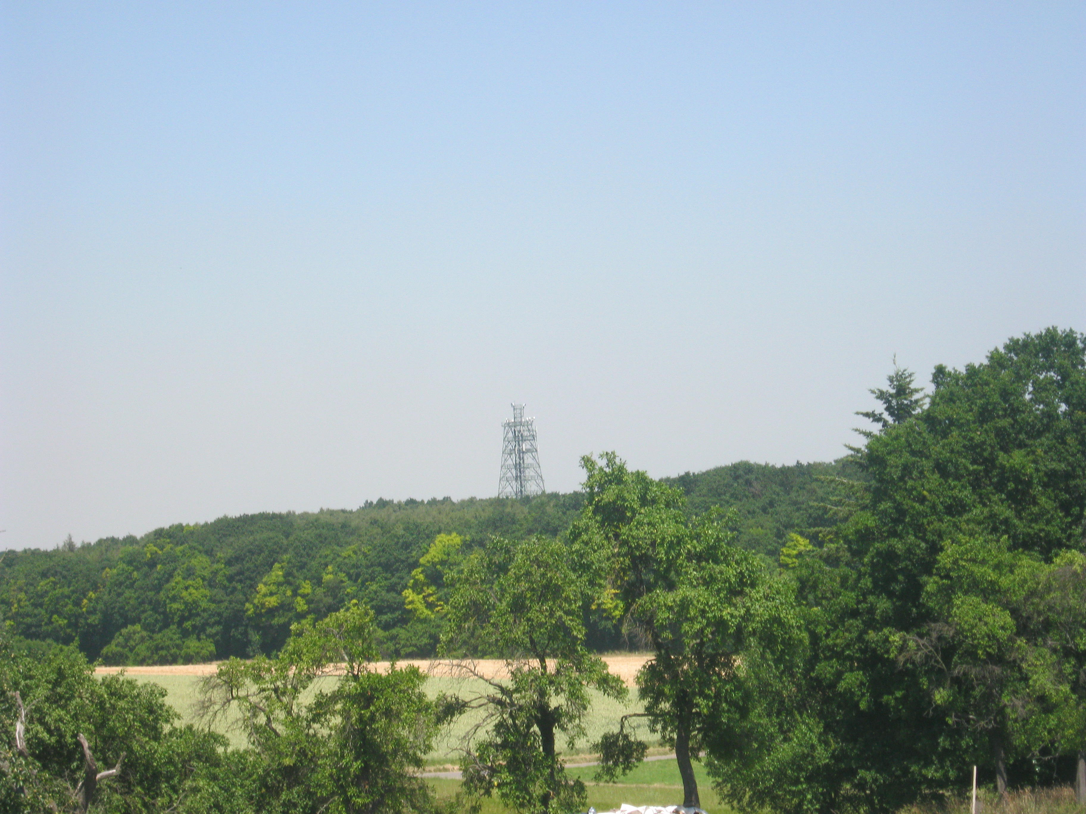 Der Turm im Hintergrund